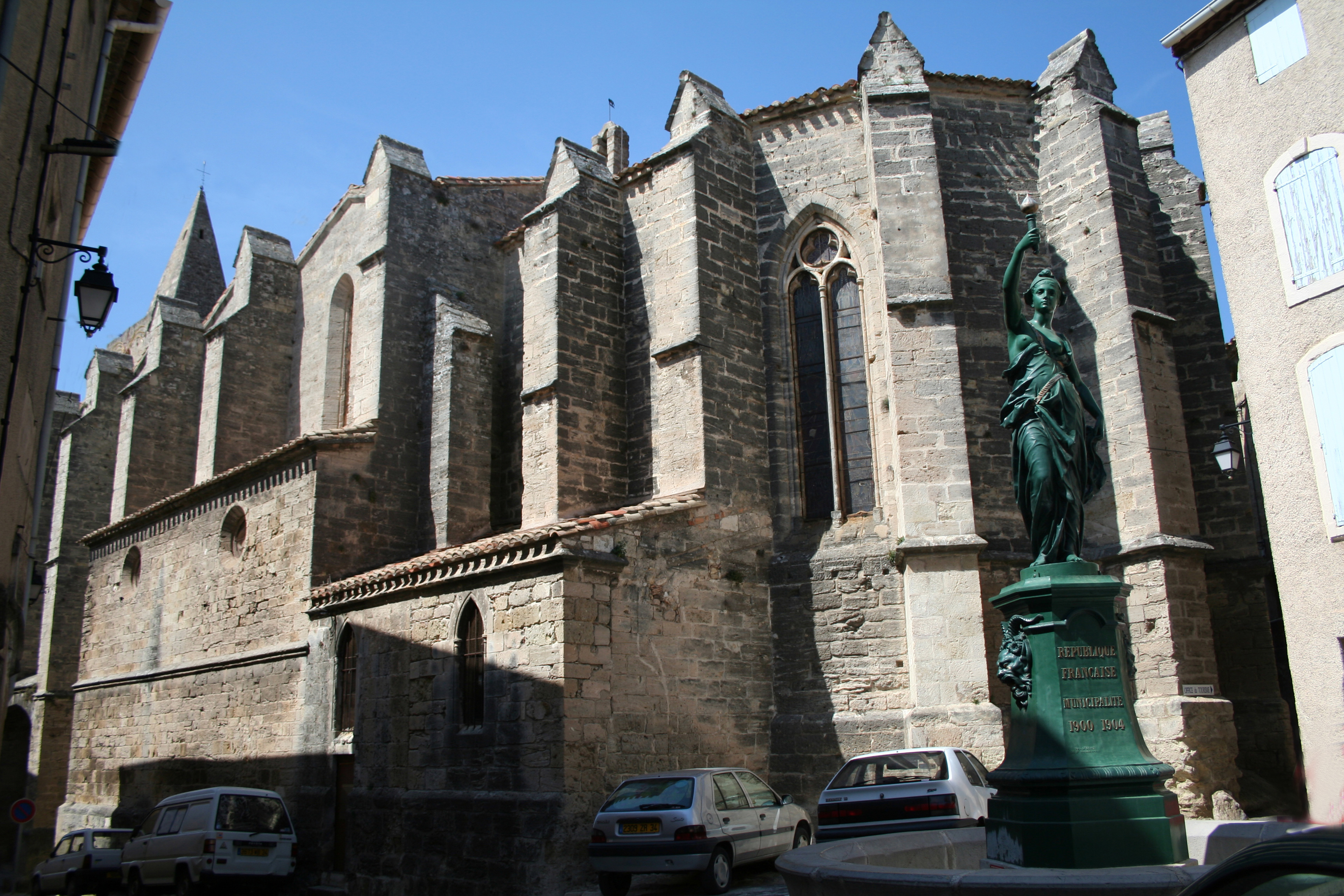 Saint-Pargoire (Hérault) - chevet de l'église Saint-Pargoire.